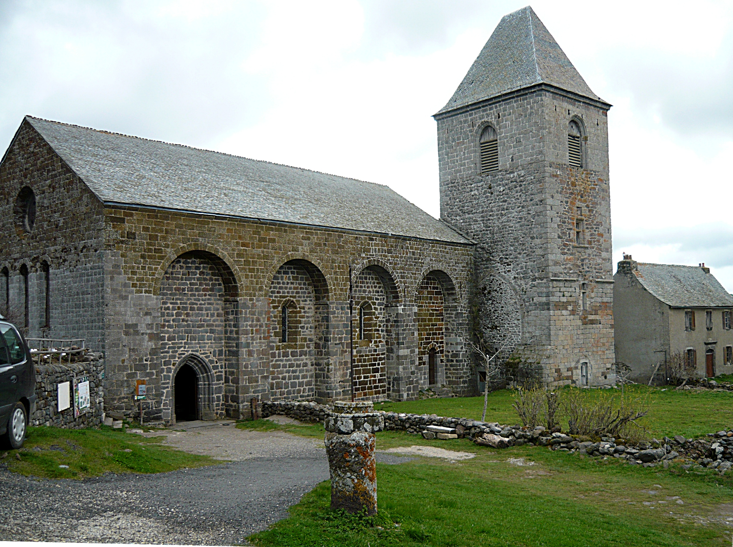 Die Kirche des alten Hospizes von Aubrac.